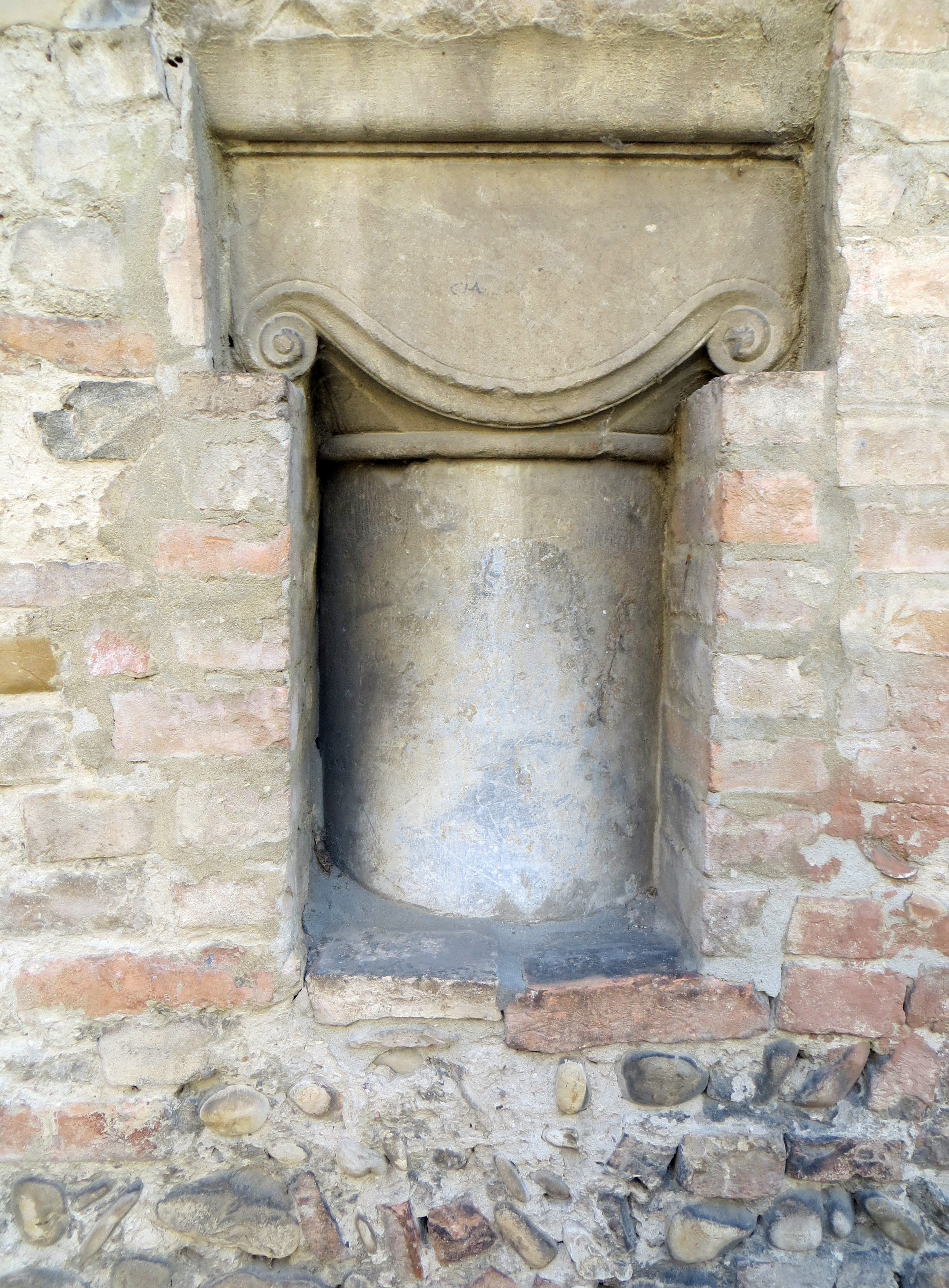 Collegio Maria Luigia - capitello medievale nella facciata laterale